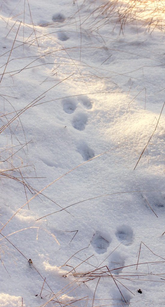 Spår av hare i snö.